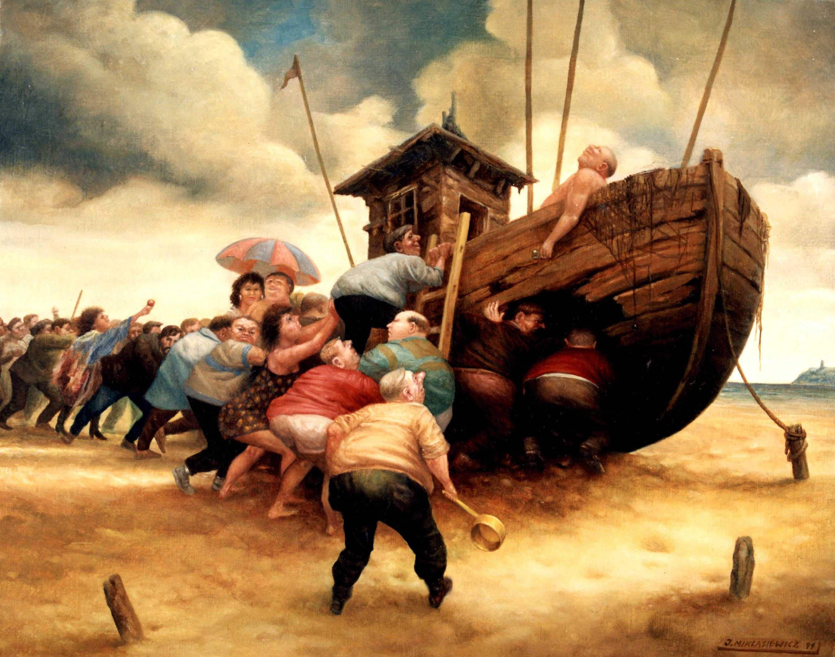 description